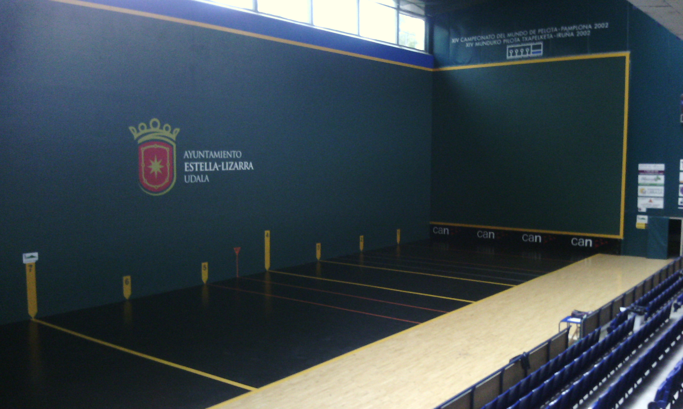 Remontival pilotalekua, Lizarra, Nafarroa Garaia